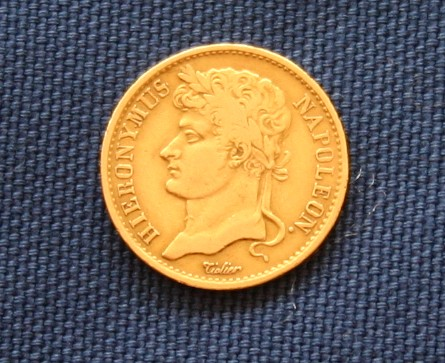 Goldmünze von Jérôme Bonaparte